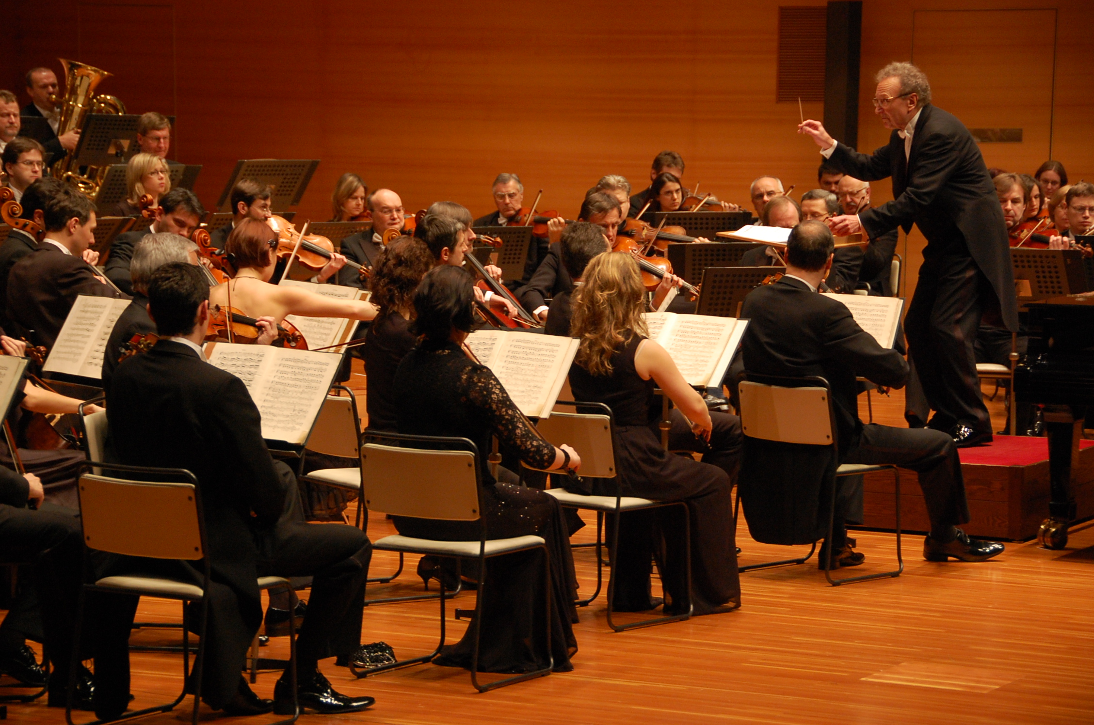 Symfonický orchestr hl. města Prahy FOK na turné v Japonsku leden 2008